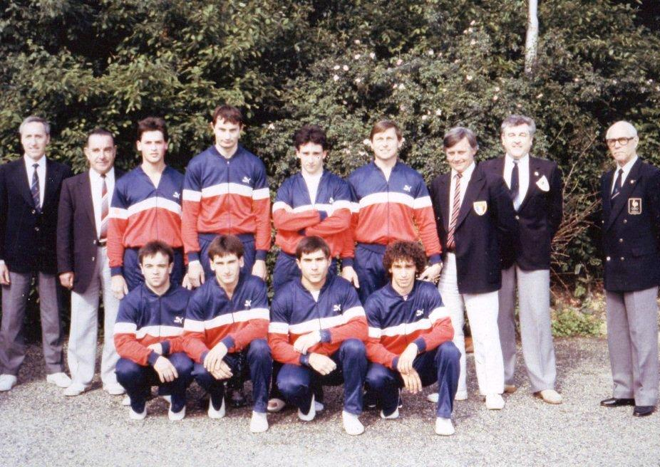 Equipe Fédérale FSCF, le 07-06-87